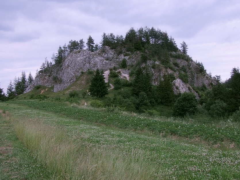 Skała Obłazowa (w Przełomie Białki pod Krempachami)